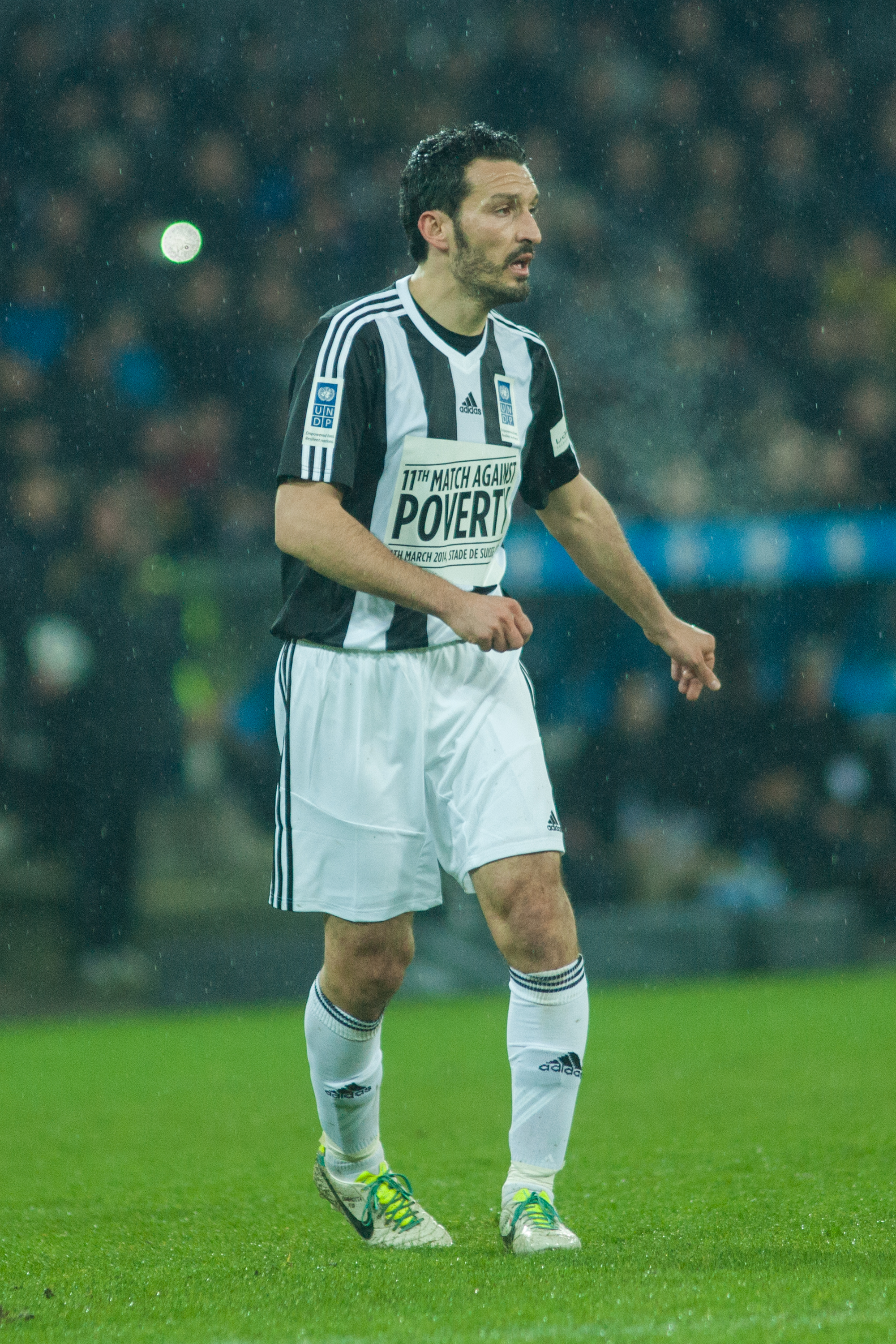 Football against poverty 2014 - Gianluca Zambrotta